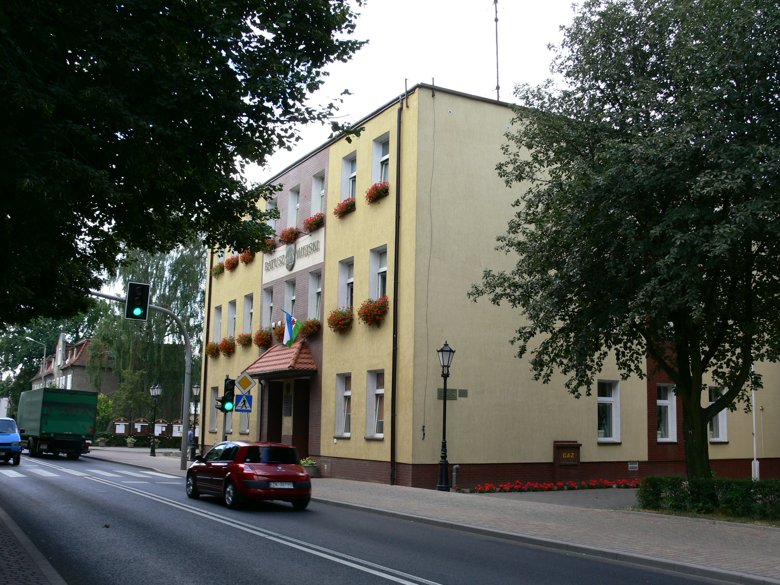 Kalisz Pomorski - Ratusz-siedziba Urzędu Miejskiego